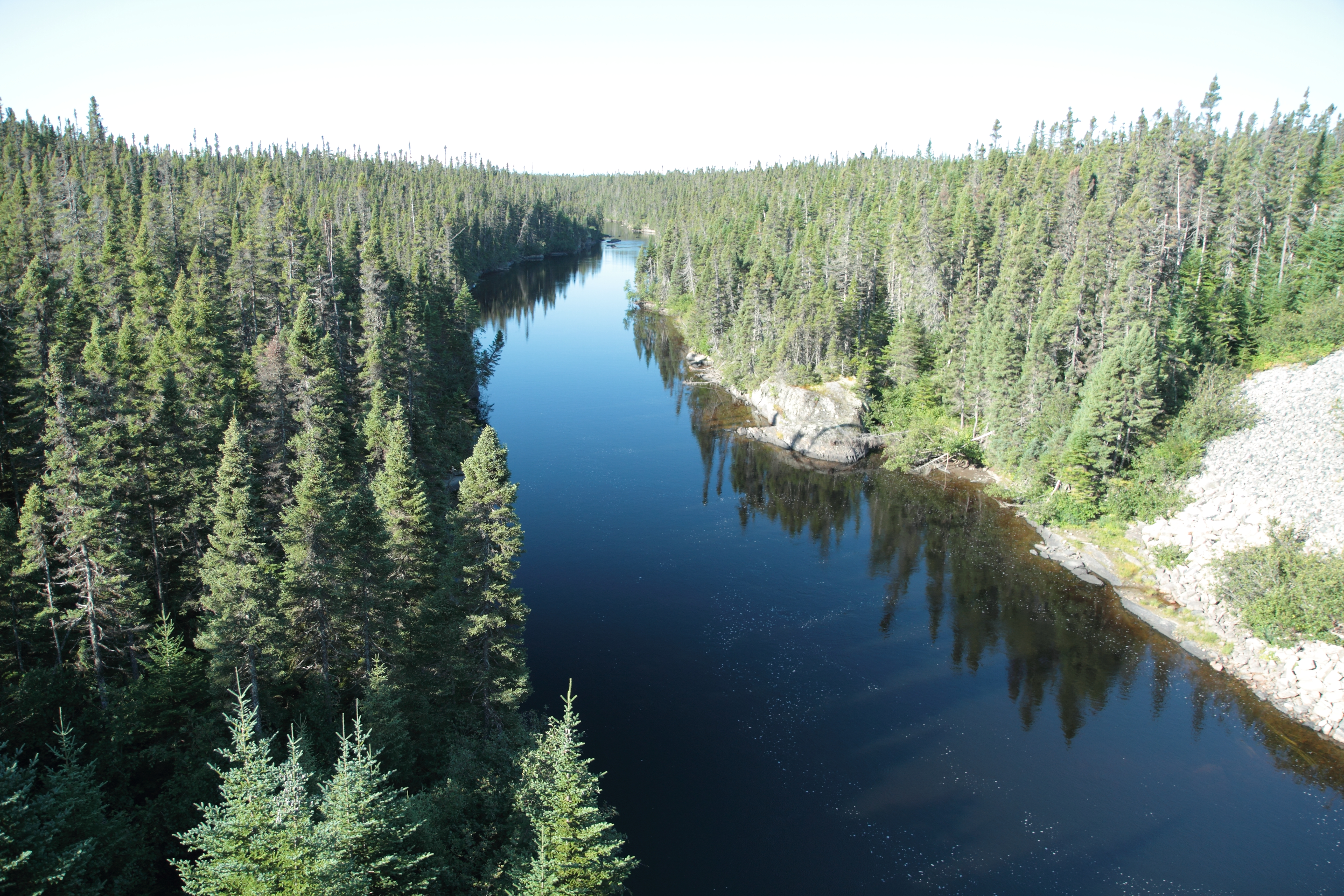 Rivière Quetachou, Baie-Johan-Beetz, Québec, Canada